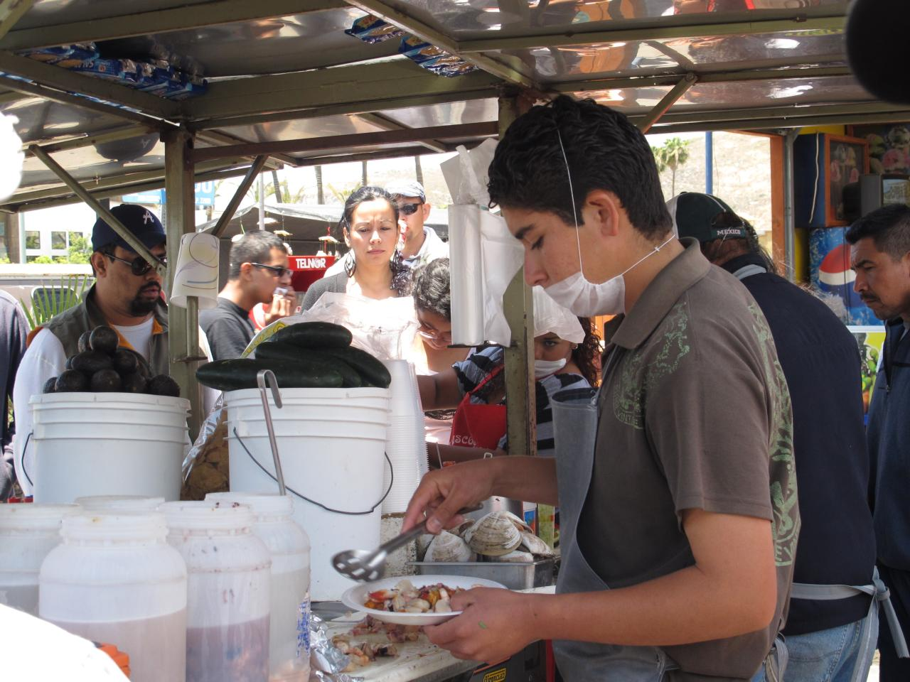 Ensenada, Baja California.